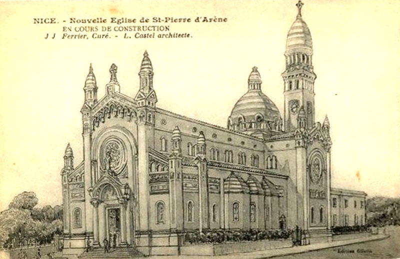 Eglise Saint-Pierre d'Arene de Nice en 1919